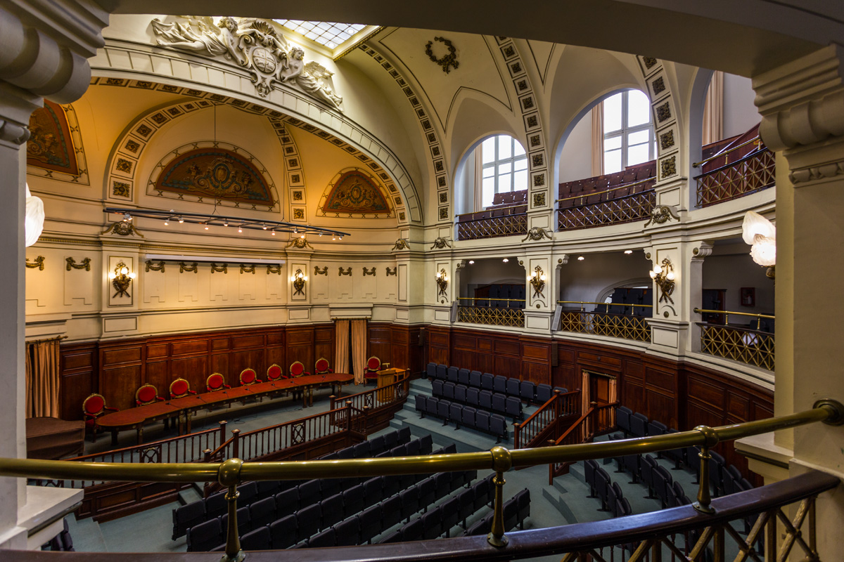 Paraninfo de la Universidad de la República. Ubicada en el departamento de Montevideo